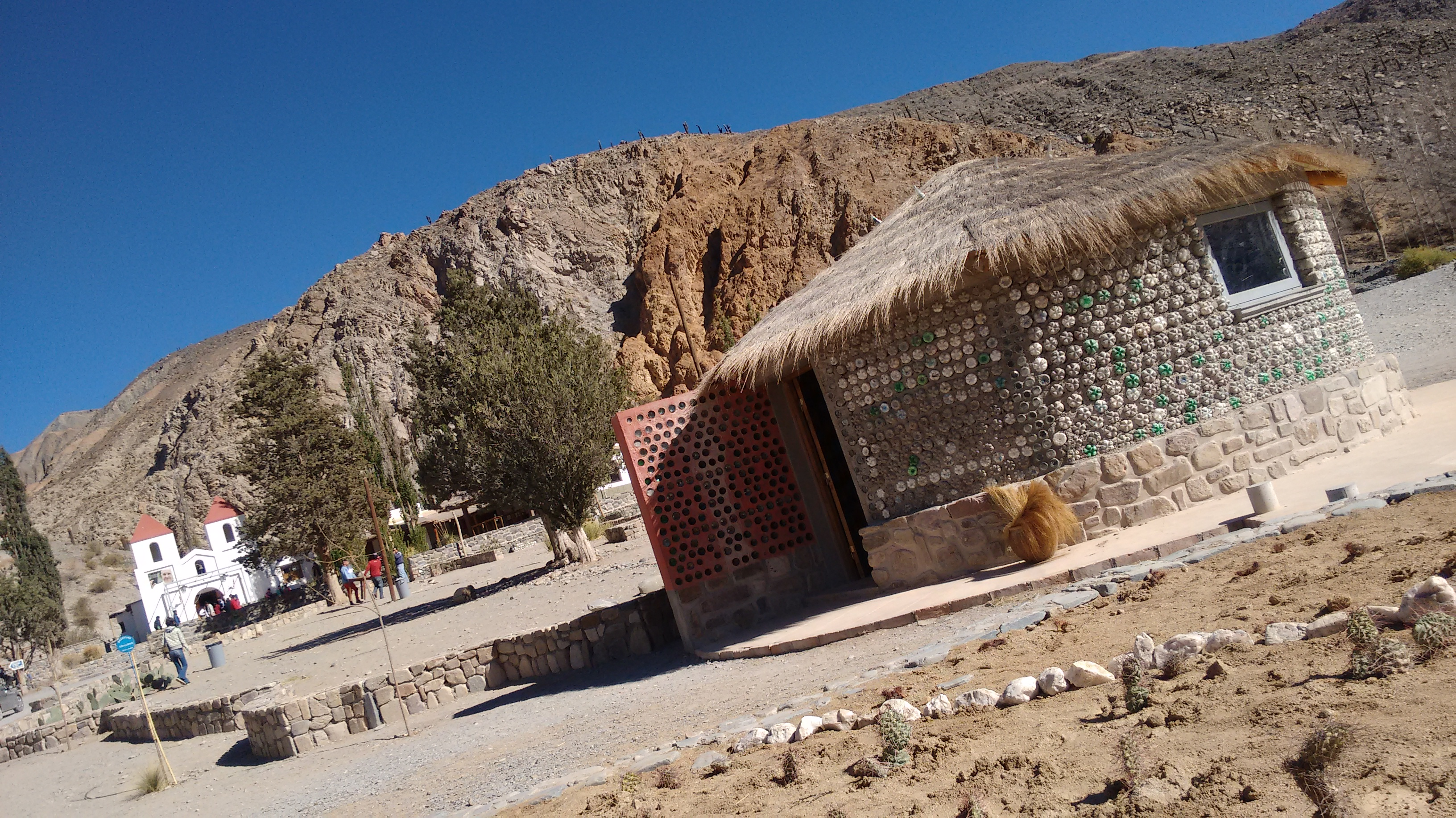 (Casa Ecológica) Centro de Información turística y merchandising.